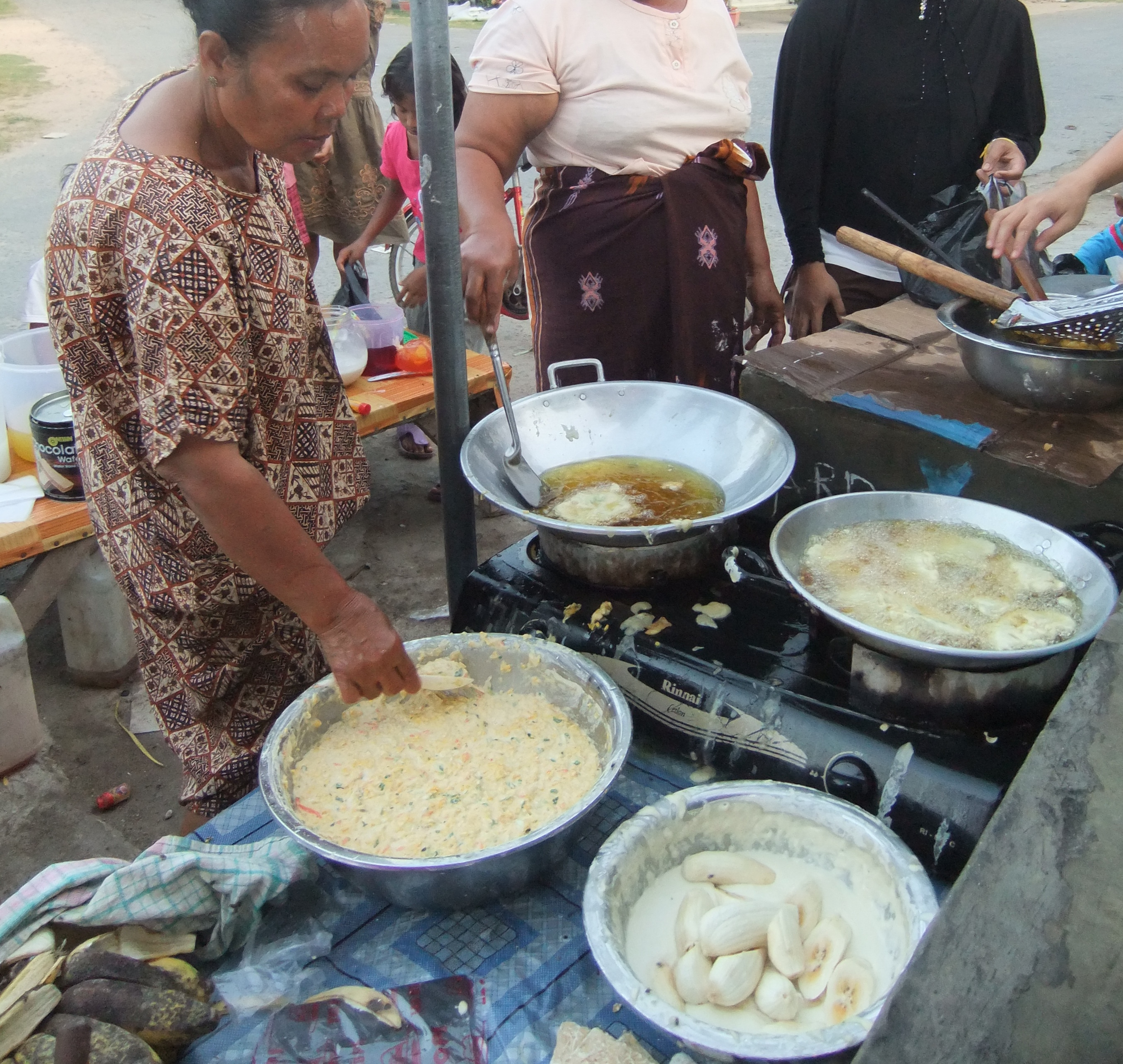 Menggoreng bakwan dan pisang di Pulau Karimun Jawa